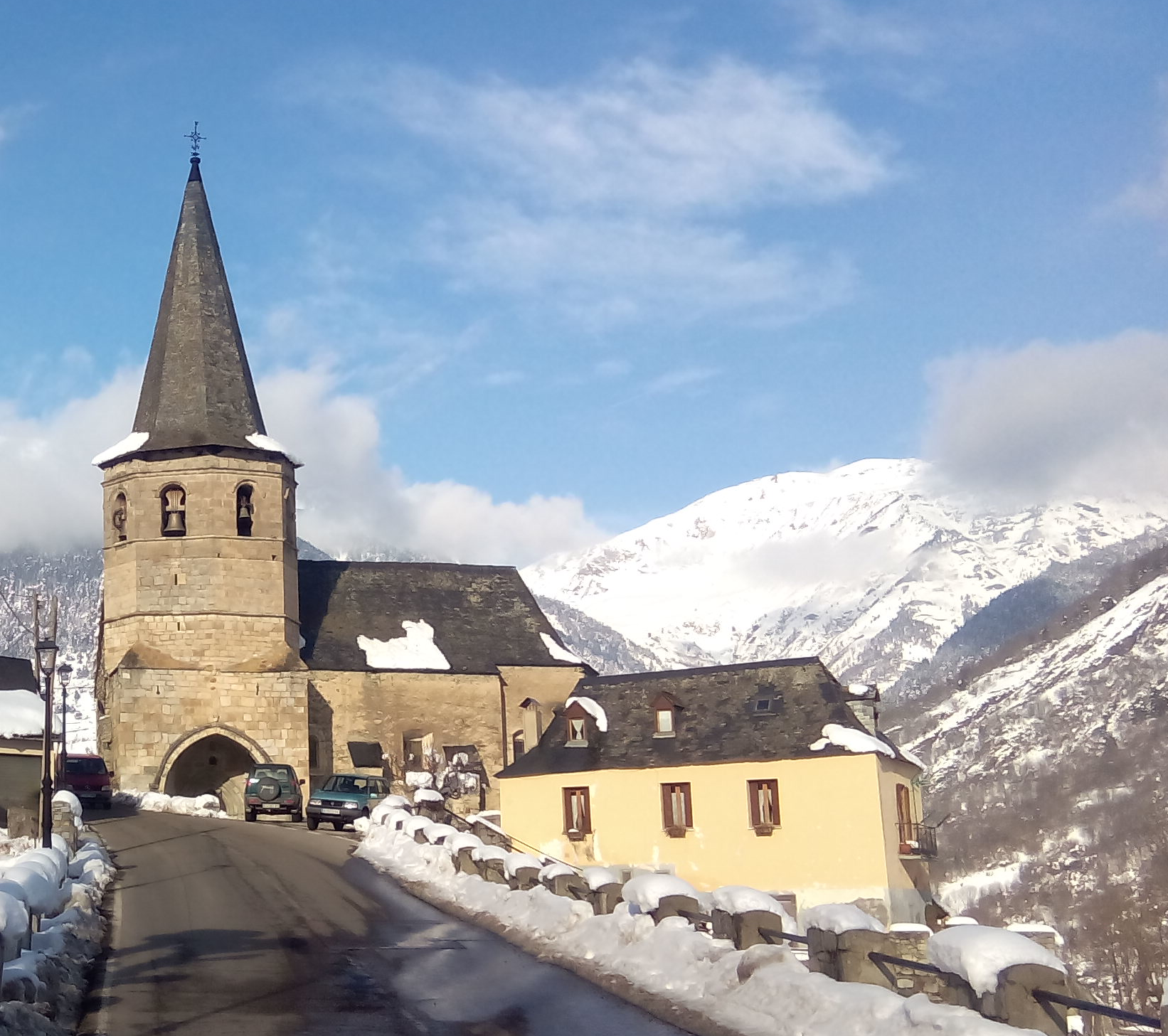 Vista de la iglesia de San Martín de Tours de Gausac